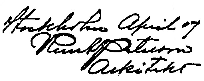 Knut Peterssons namnteckning